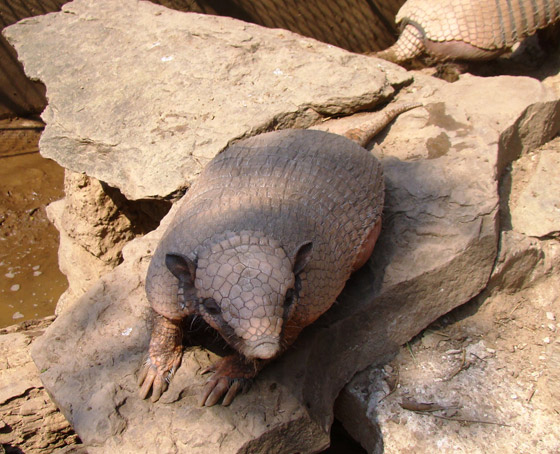 Una especie muy conocida y cazada por su codiciada carne.Es una especie protegida.